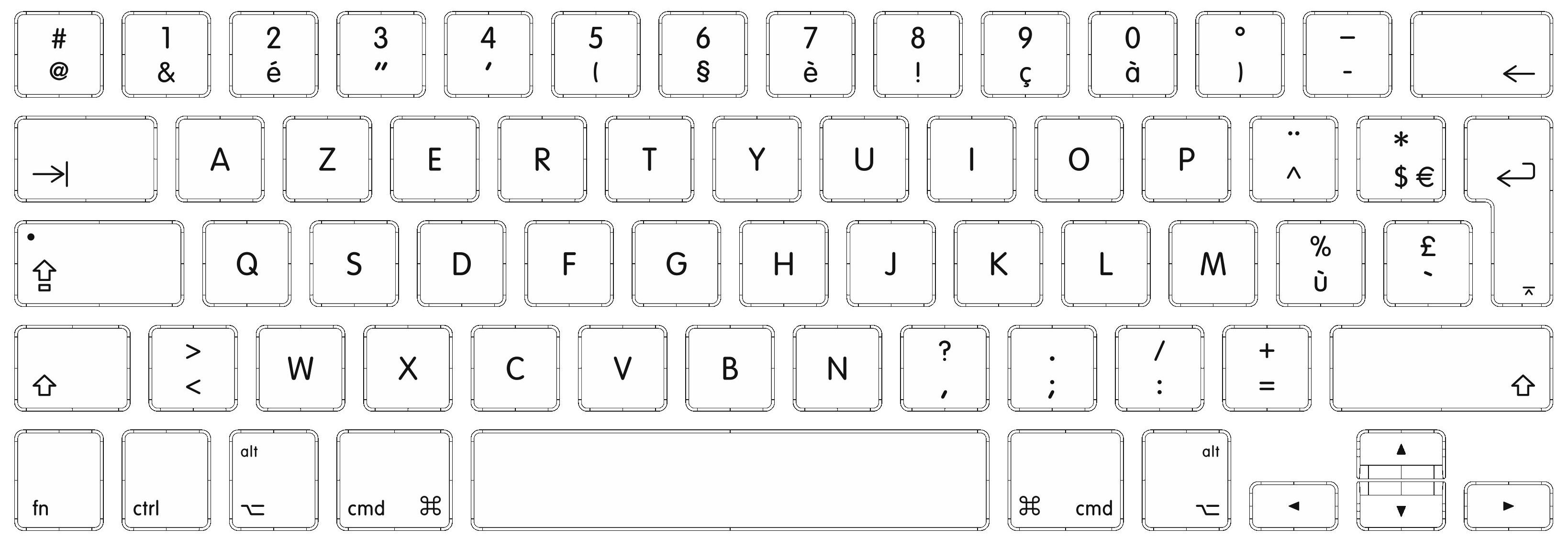 Clavier français version Mac